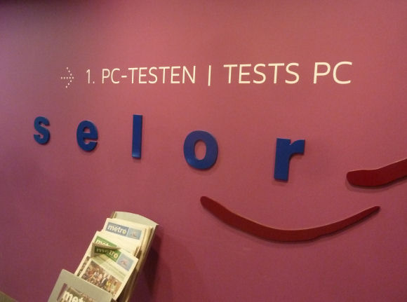 selor Brussel